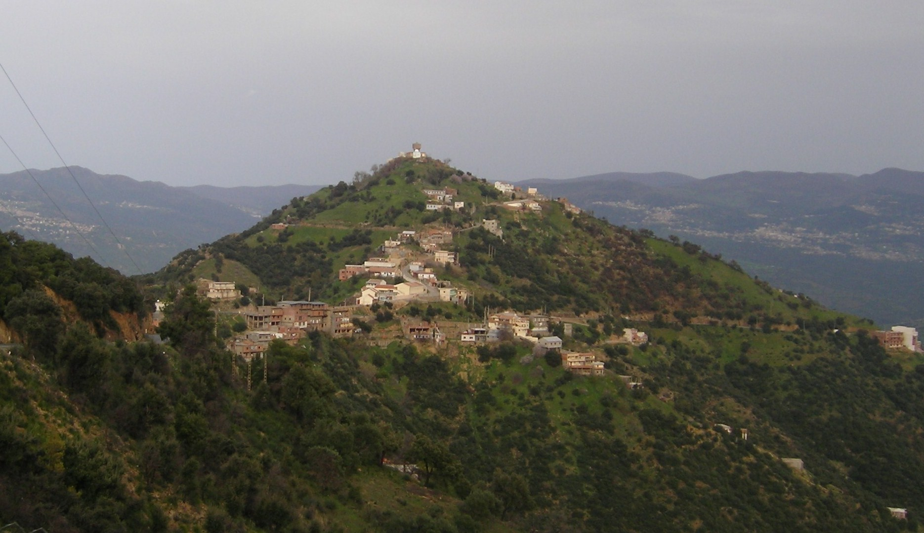 Le village Koukou sur le mont du même nom, photographié depuis Tafrawt. Commune de d'Aït Yahia en Kabylie (Tizi Ouzou, Algérie).